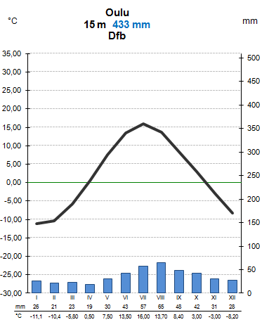 See on Oulu kliimadiagramm